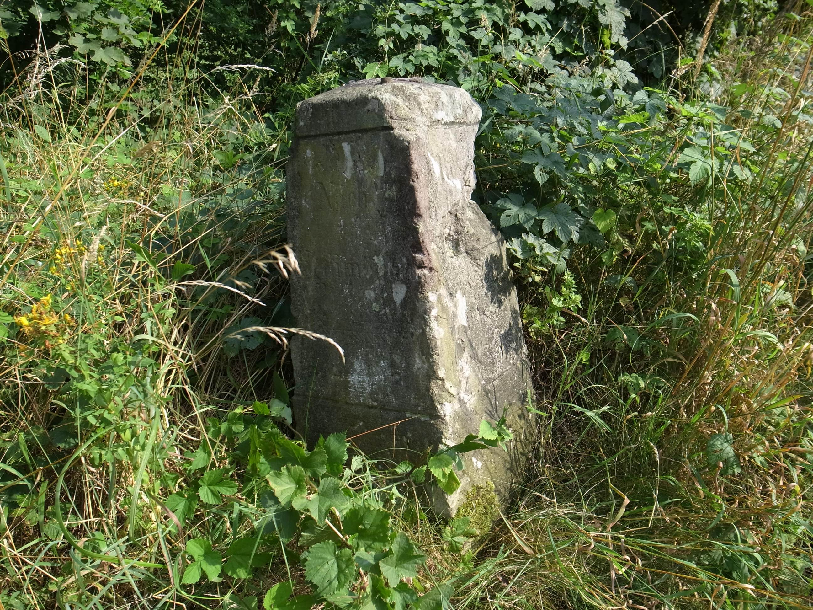 Wegweiser zwischen Sollnitz, Retzau und Möhlau. Der Stein ist stark Beschädigt. Die noch lesbare Inschrift lautet: Nach Kleinmöhlau. Höhe: 1m